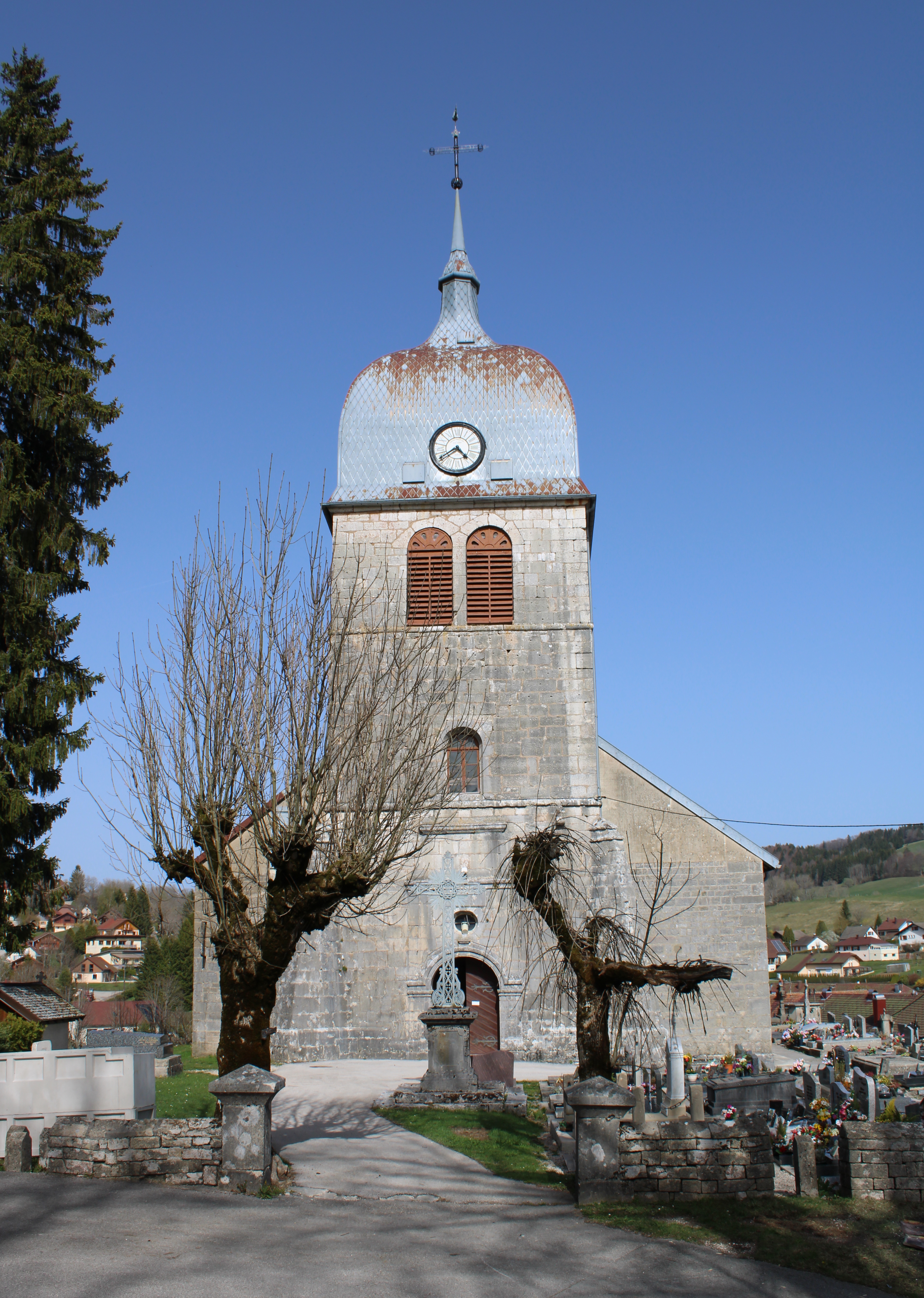 L'église